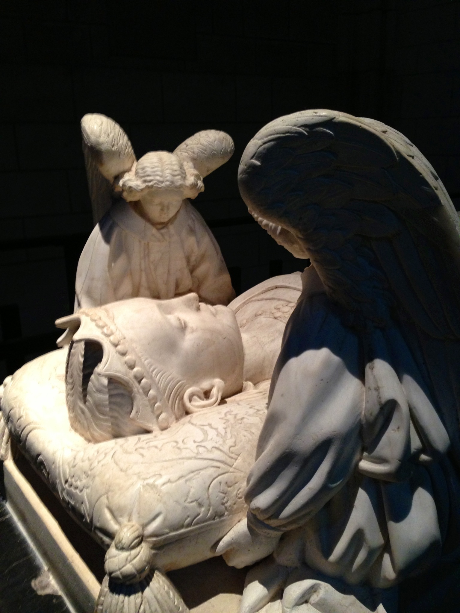 Gisant du tombeau d'Agnès Sorel, détail du visage veillé par deux anges en oraison, collégiale Saint-Ours de Loches.